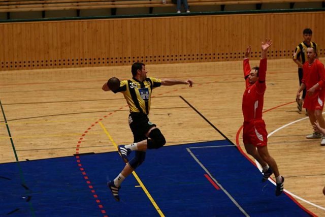 Narodni hazena - Utocnik